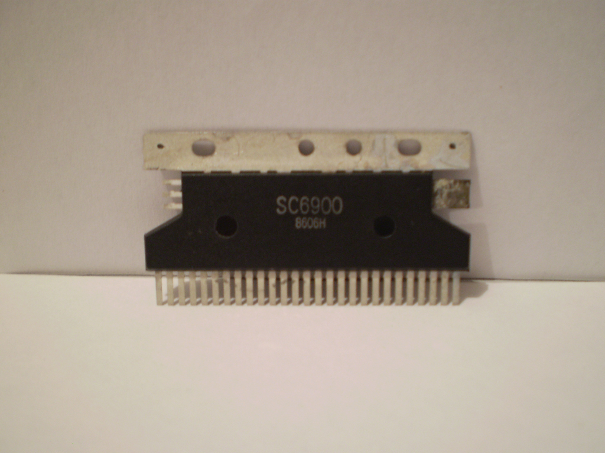 micropocessador Sharp SC6900 (descontinuado)